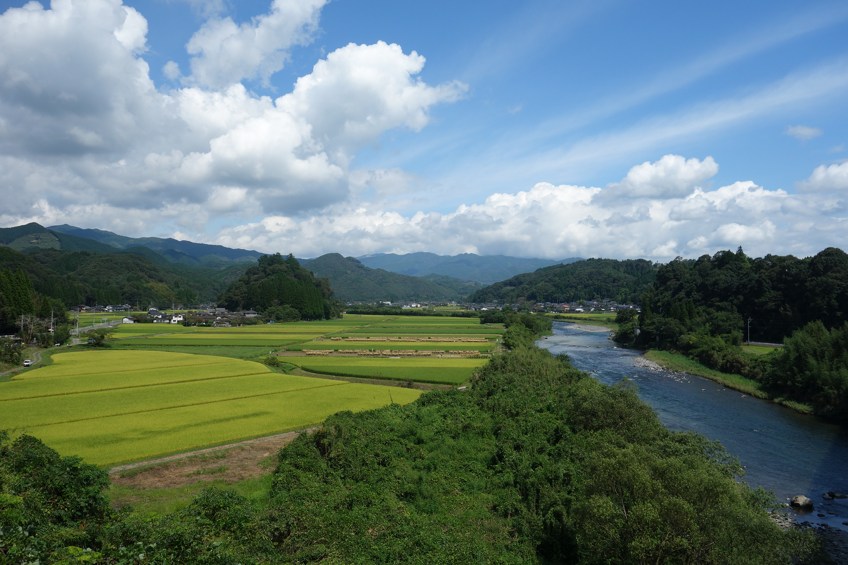 相良村の風景（相良村深水）